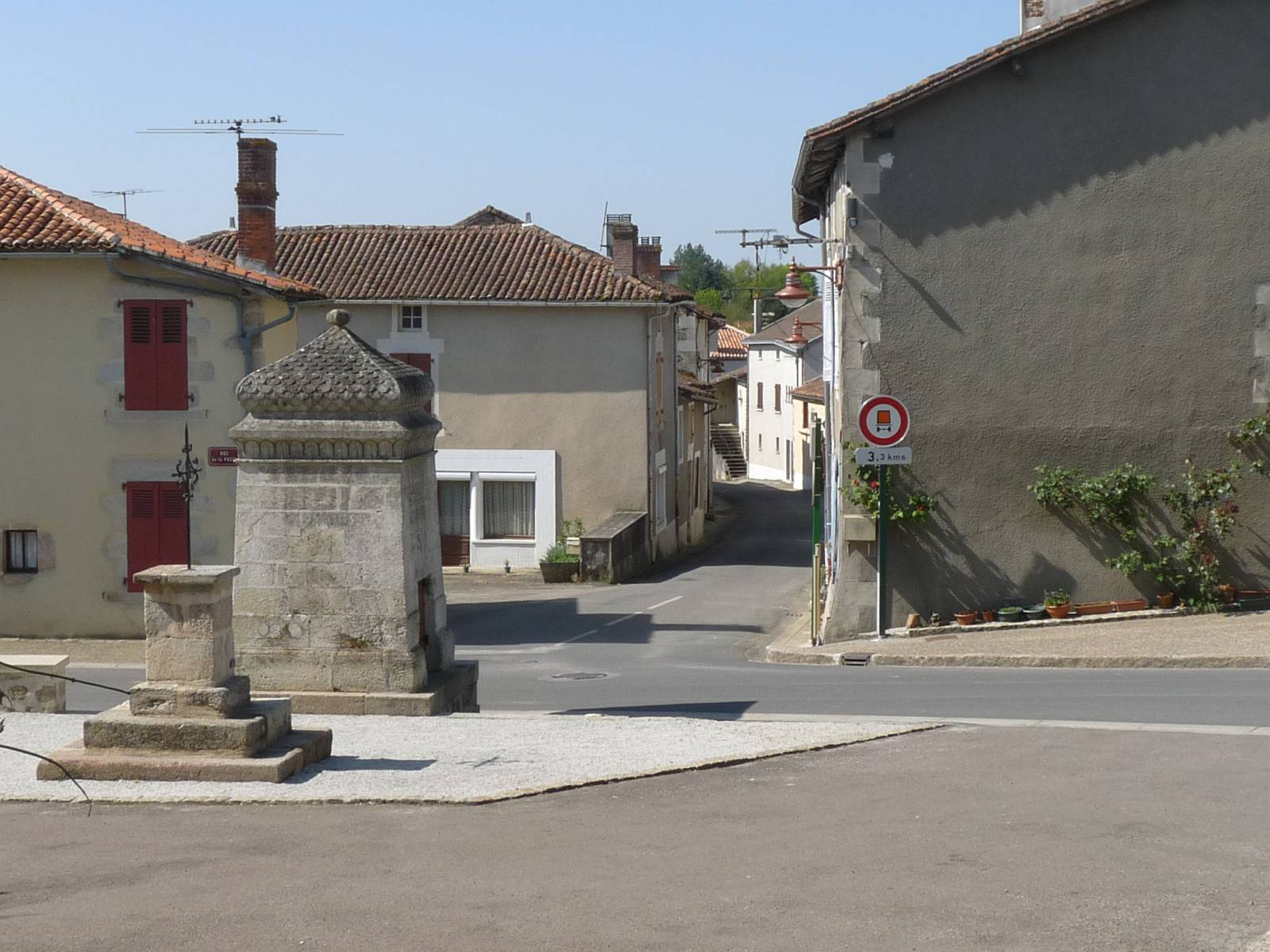 Fontaine Gaillard et rue Ferrade, Brillac, Charente, France